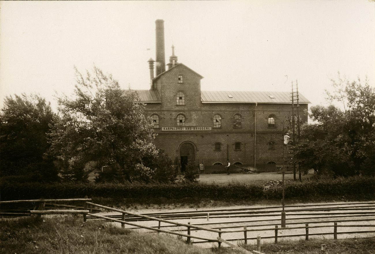 DIG91692. Karpalunds Ångbryggeri. Fotografiet är skänkt till Tekniska museet från Svenska Turistföreningen.